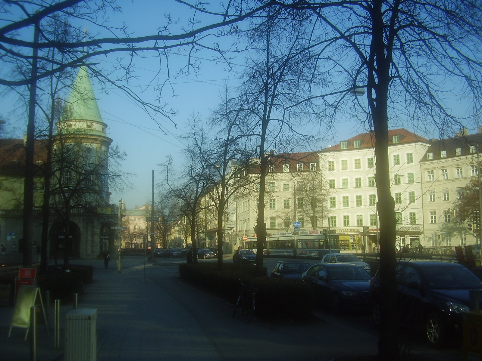 Stiglmaier Platz in München. Blickrichtung nordwestwärts zur Dachauer Straße